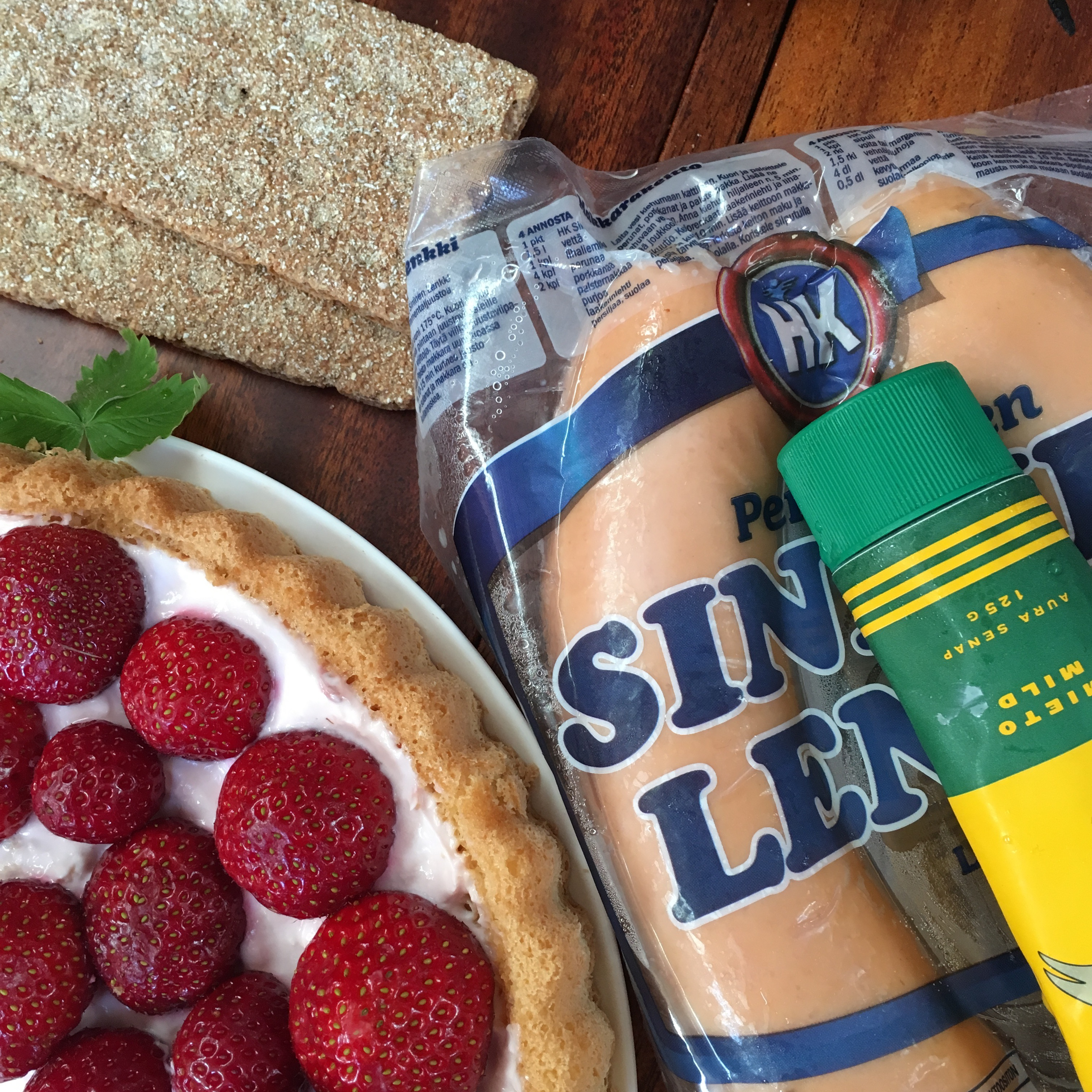 suomalaisia ruokia: näkkileipää, mansikkakakkua, lenkkimakkaraa ja sinappia